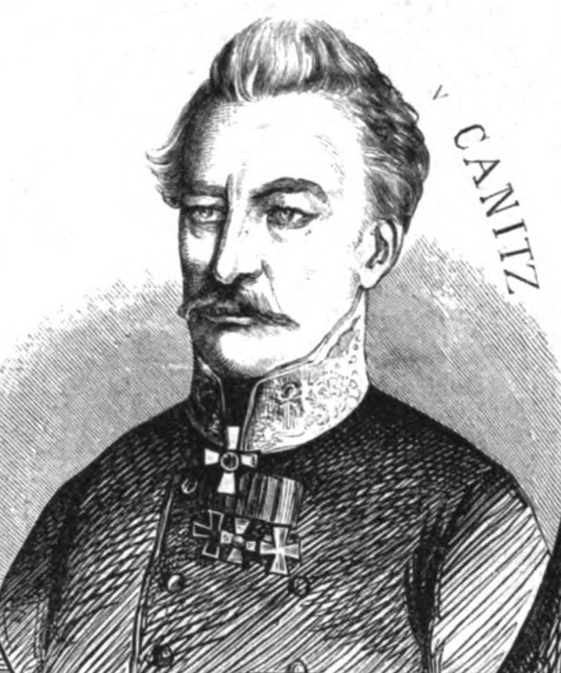 Karl Ernst Wilhelm Freiherr von Canitz und Dallwitz, preußischer Außenminister, 1847.